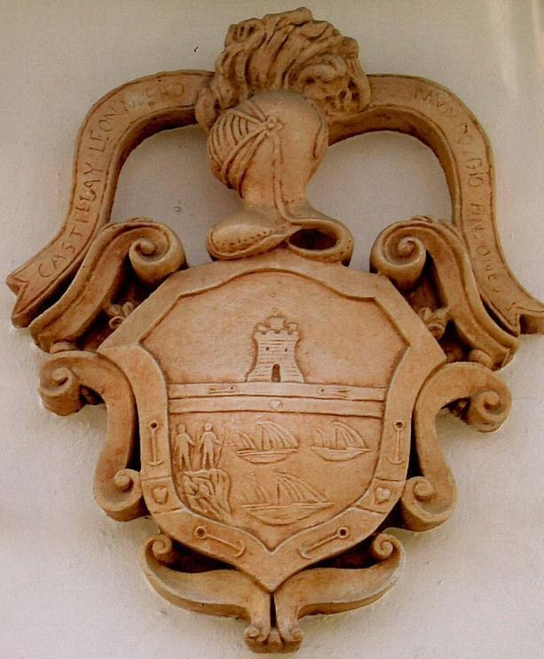 Escudo del Linaje Hernández-Pinzón situado la fachada de las casas de sus descendientes en la calle Alonso Niño de Moguer (Huelva).